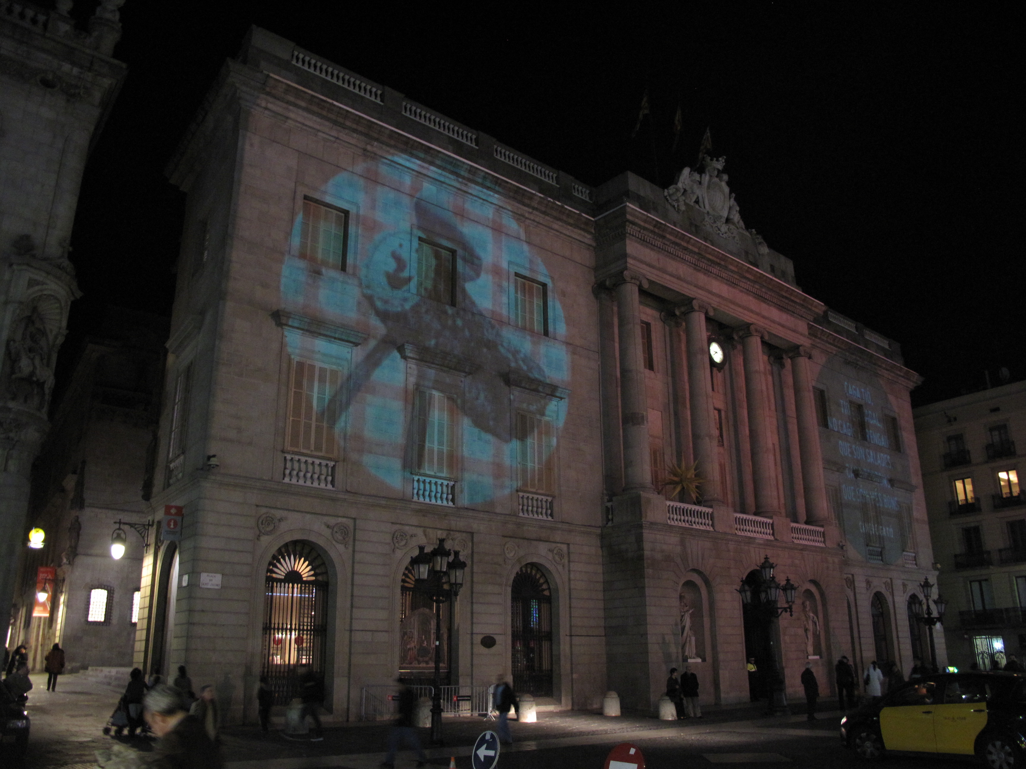 Casa de la Ciutat (Barcelona)